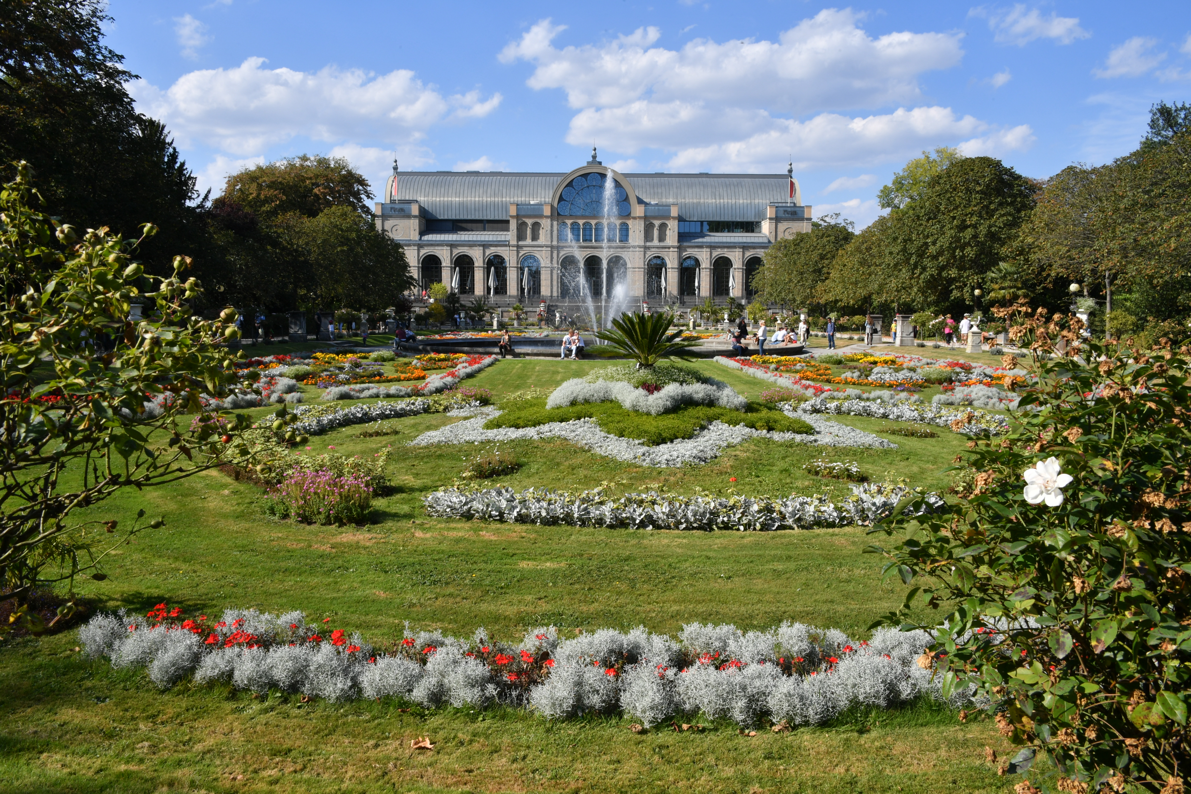 Botanischer Garten von Köln